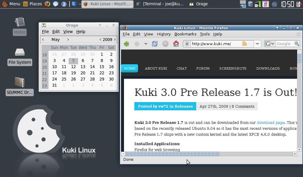 kuki linux screenshot